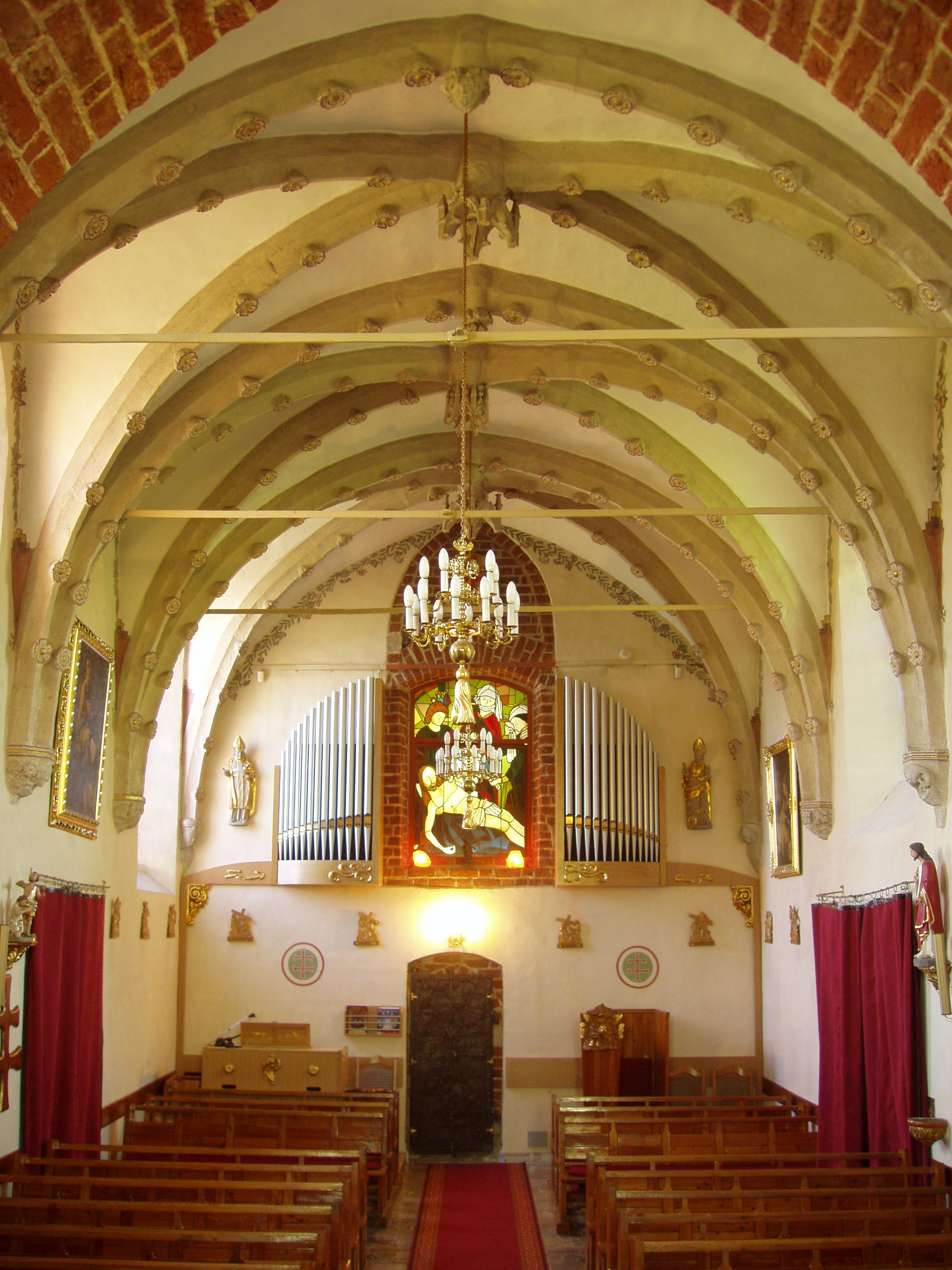 Nawa kościoła św. Jana Chrzciciela w Gnieźnie